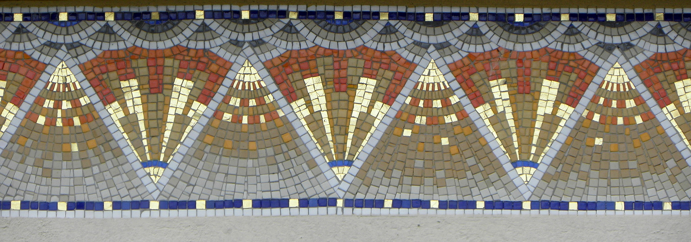 Mosaïques d'Isidore Odorico ornant l'usine Morel et Gâté de Fougères (35).